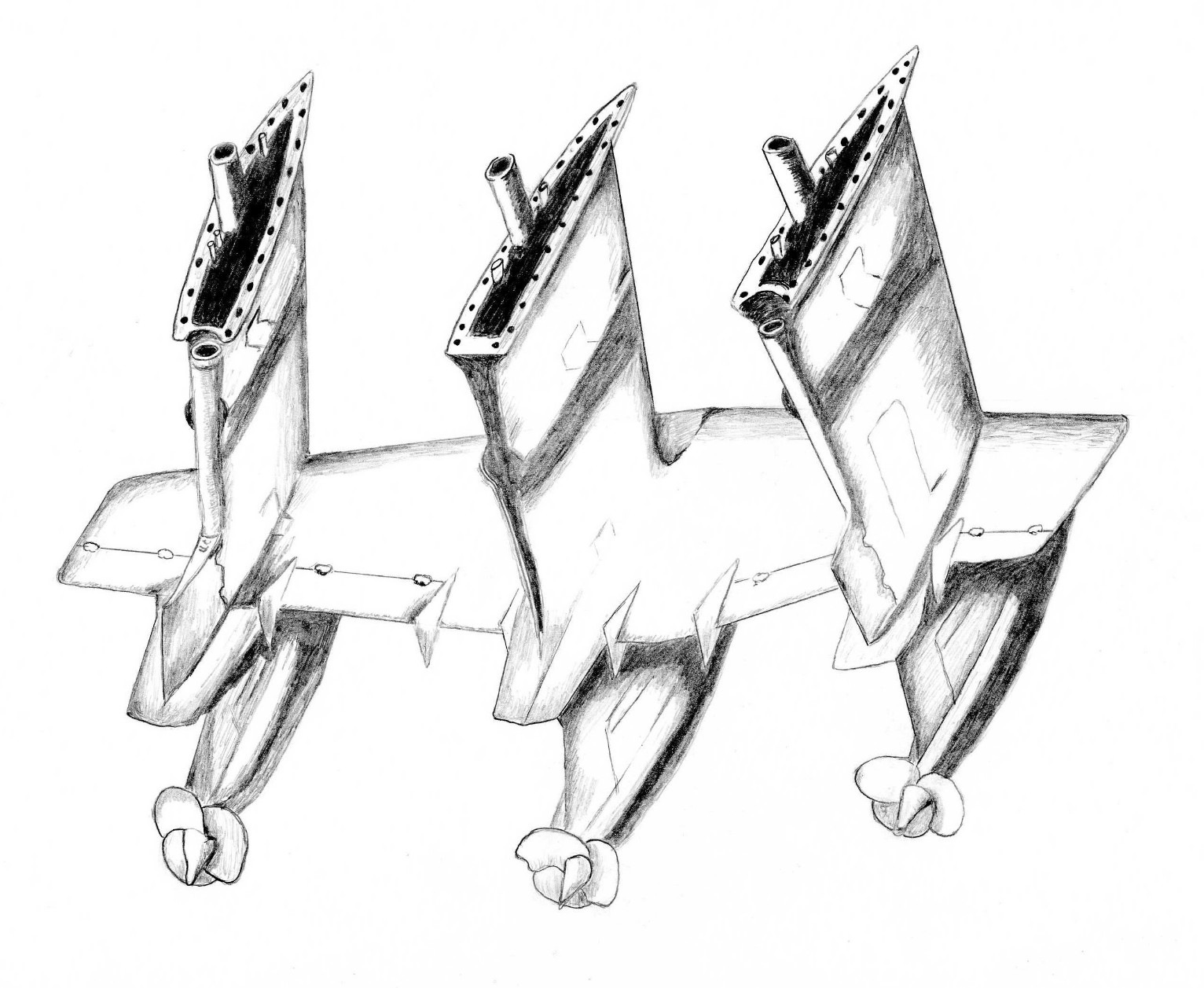 Кормовой крыльевой комплекс малого противолодочного корабля на подводных крыльях проекта 1141